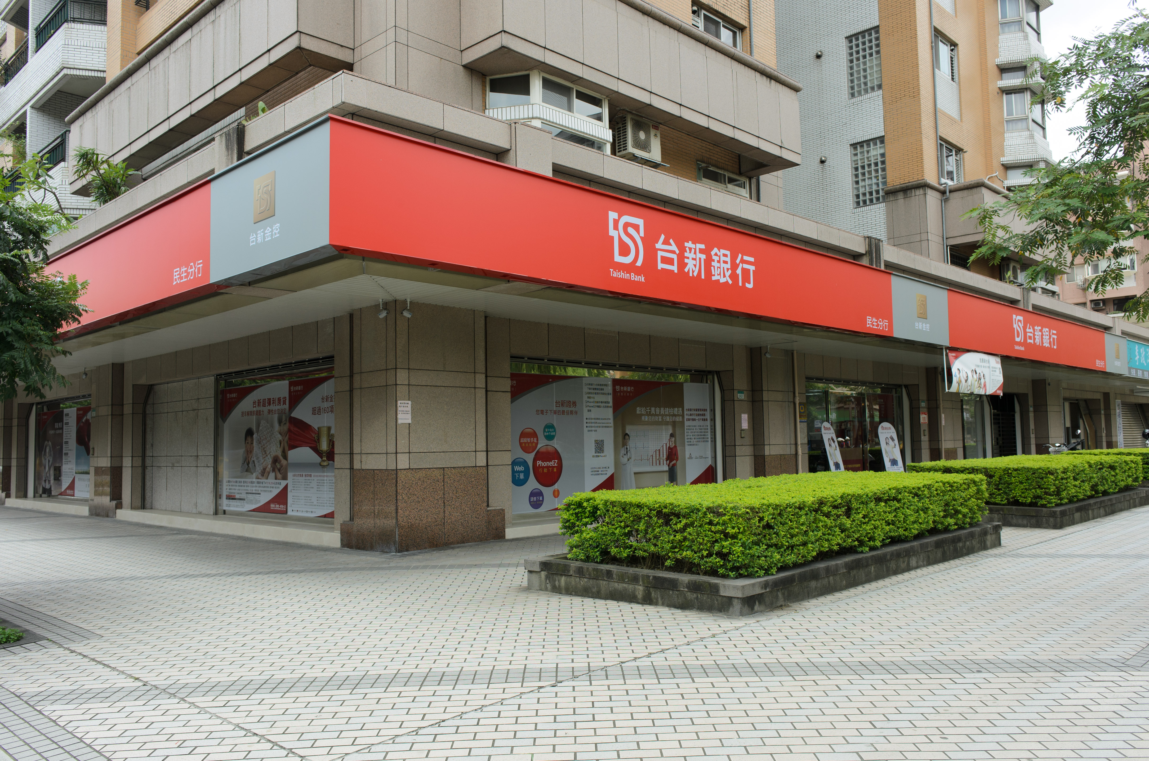 台新國際商業銀行民生分行，2015年2月遷移至現址營業，地址：臺北市松山區三民路88號。